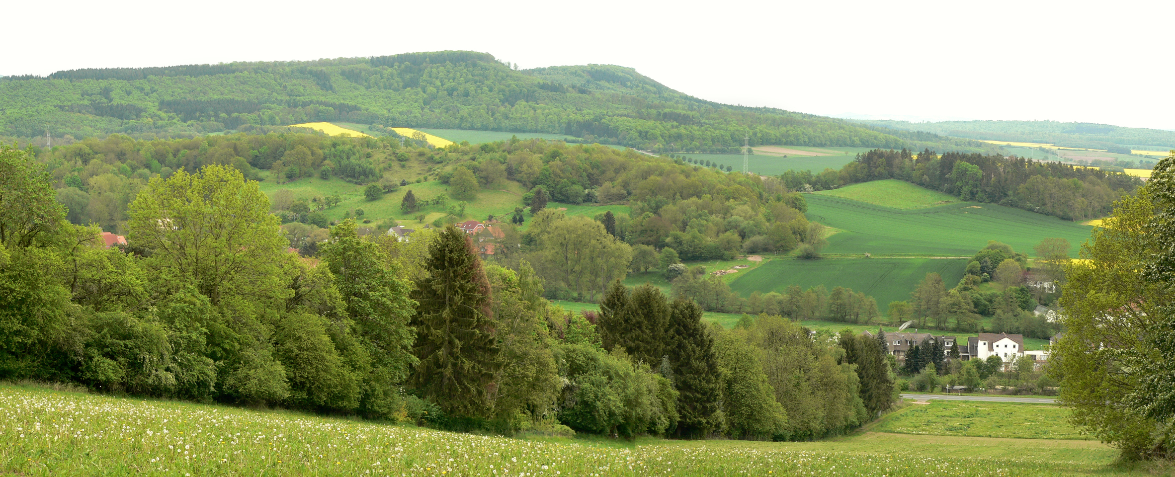 Landschaftsschutzgebiet und Geotop Dütberg, Panorama mit Schecken